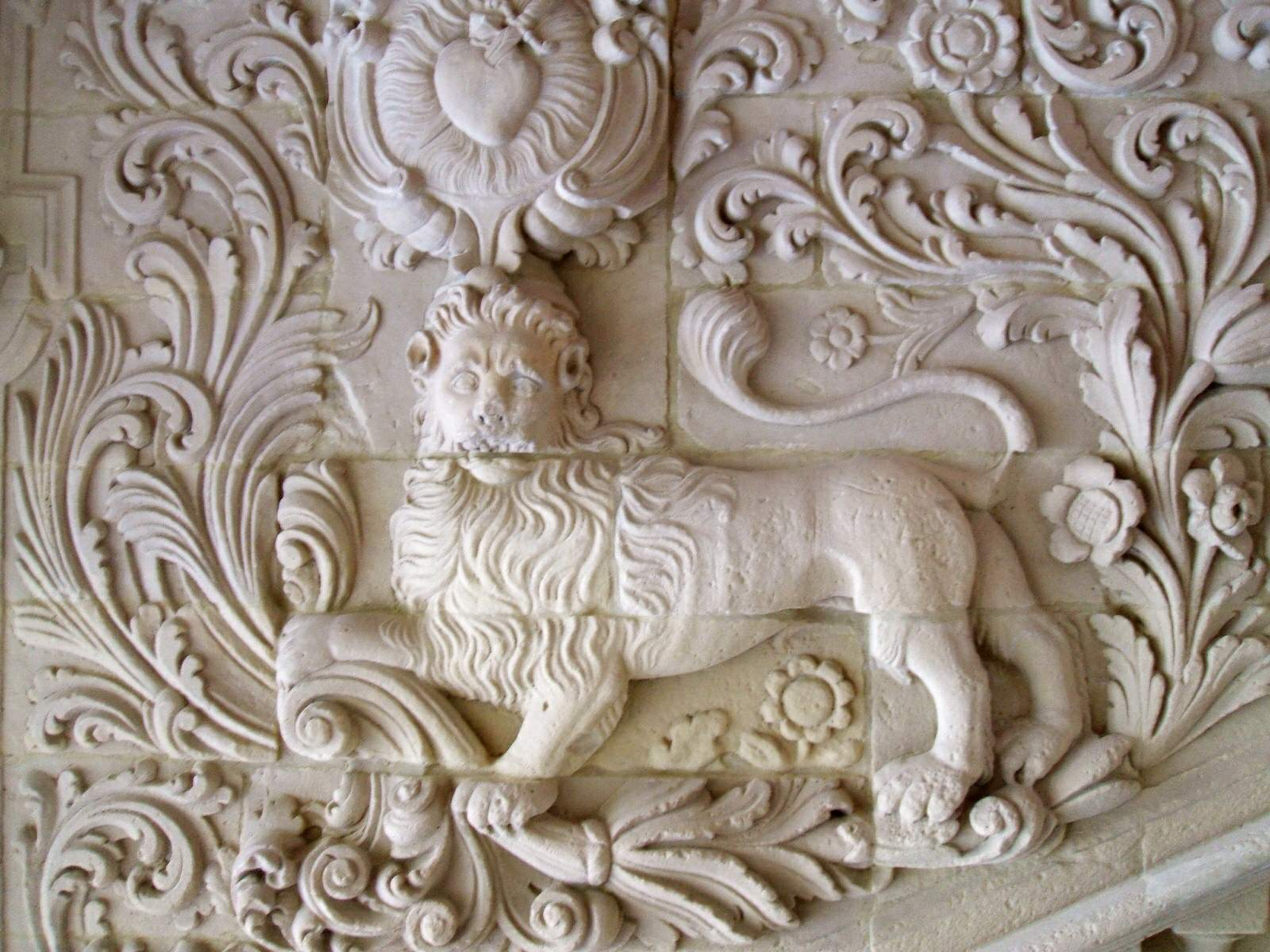 Patio del Palacio de Jabalquinto (Baeza, Jaén). Relieve de león en la escalera del patio